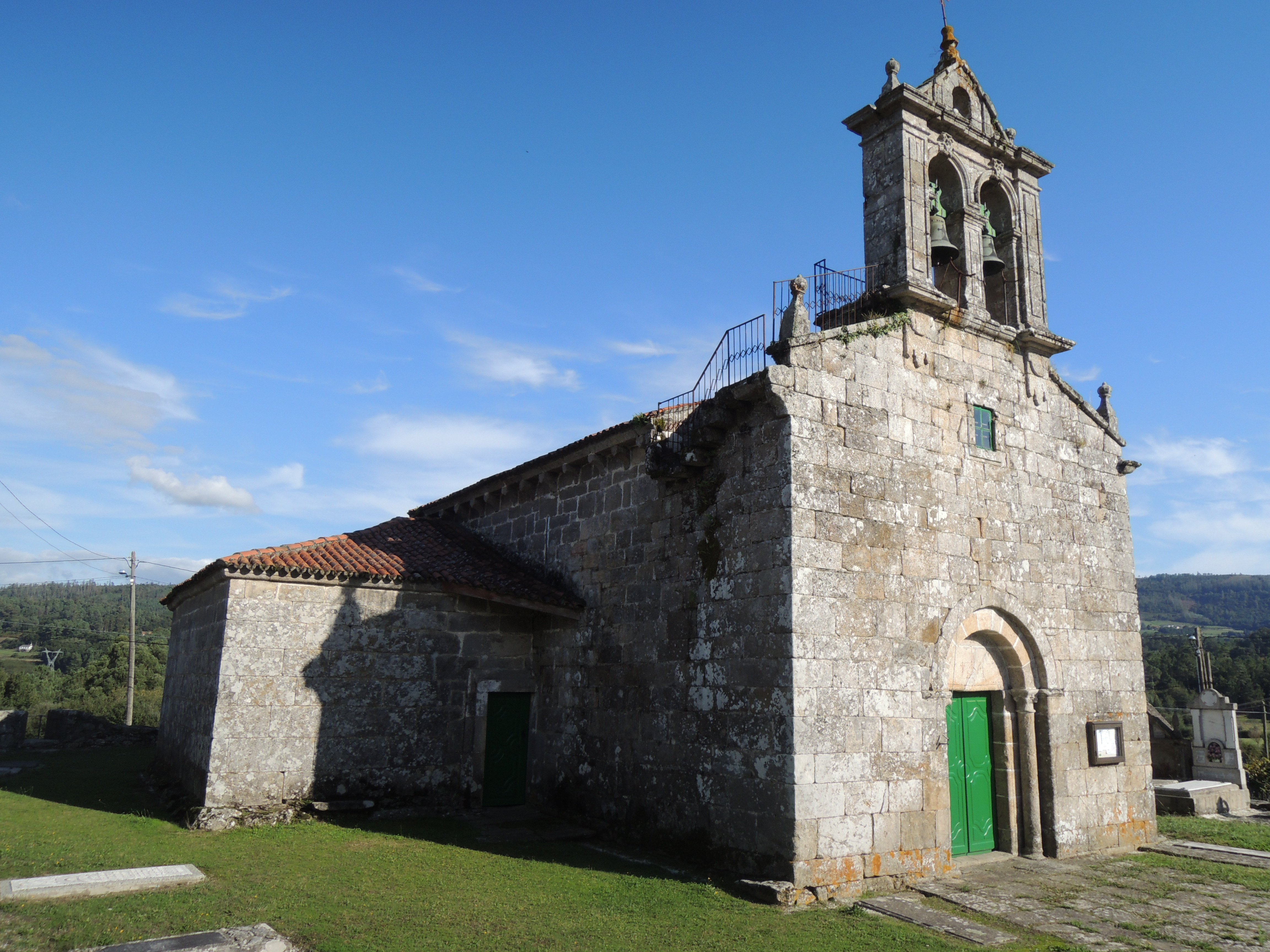 Iglesia de San Martiño de Riobó